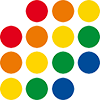 Logotipo RECIDA